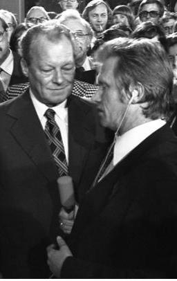 Bundestagswahl - Wahlnacht in der SPD - Bundesgeschäftsstelle